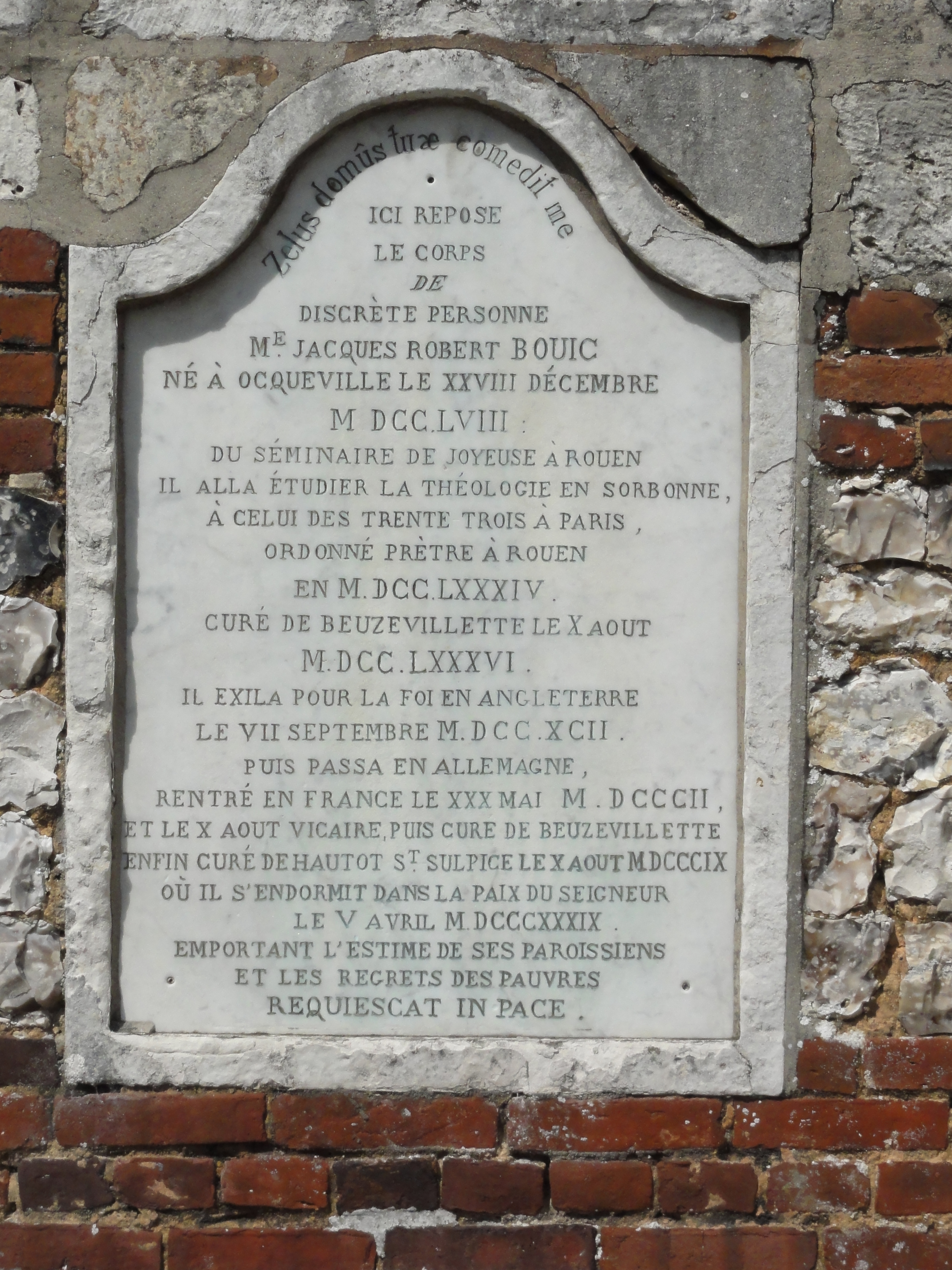 Hautot-Saint-Sulpice (Seine-Mar.) église, plaque curé exilé